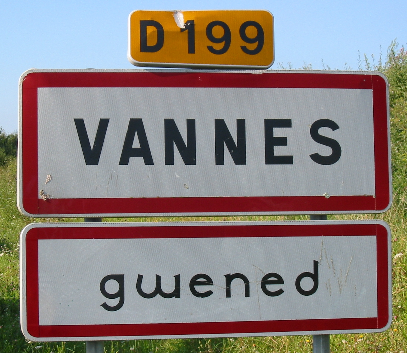 Bilingual sign, Vannes